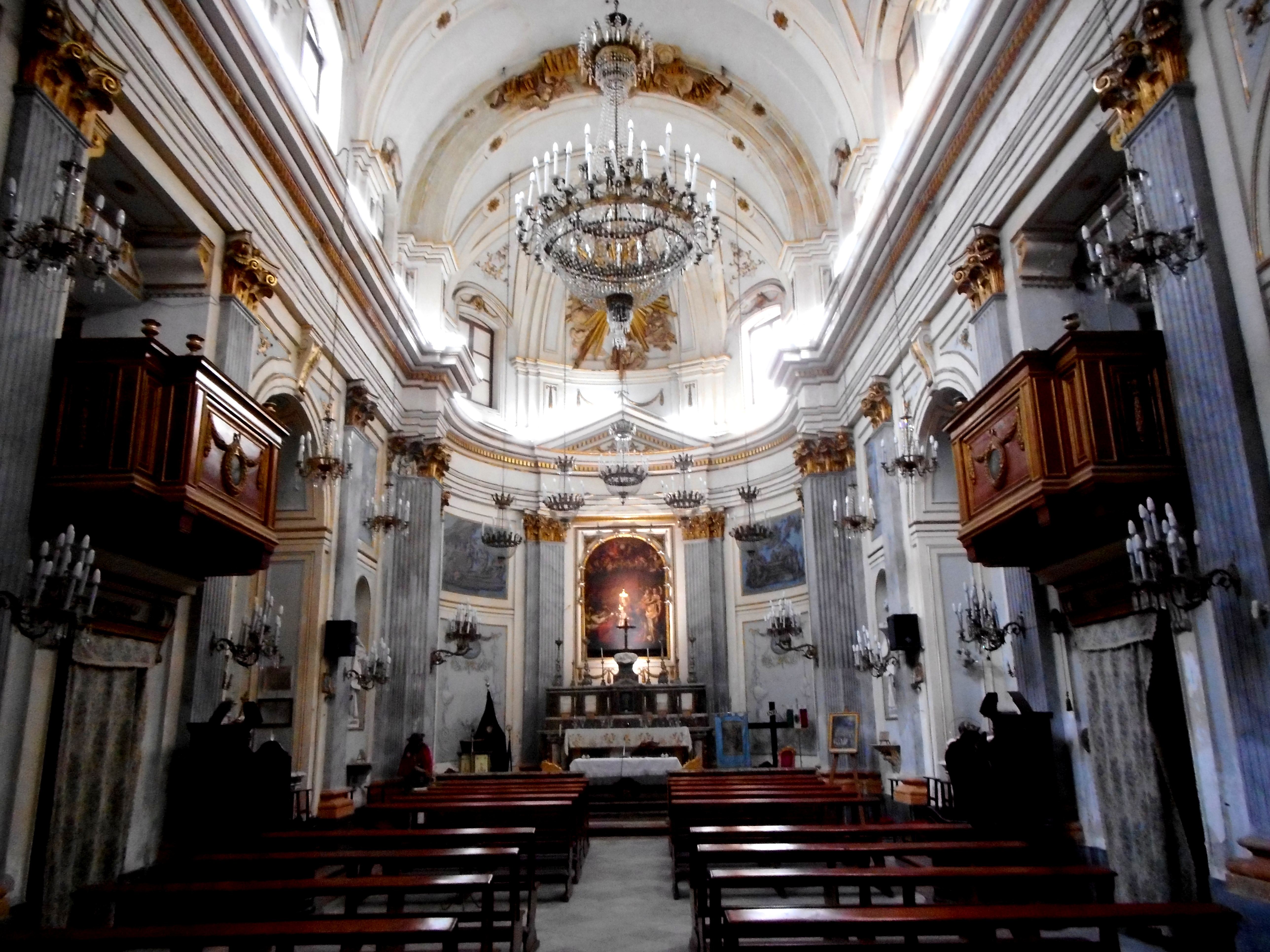 Interno della chiesa di Santa Maria degli Agonizzanti